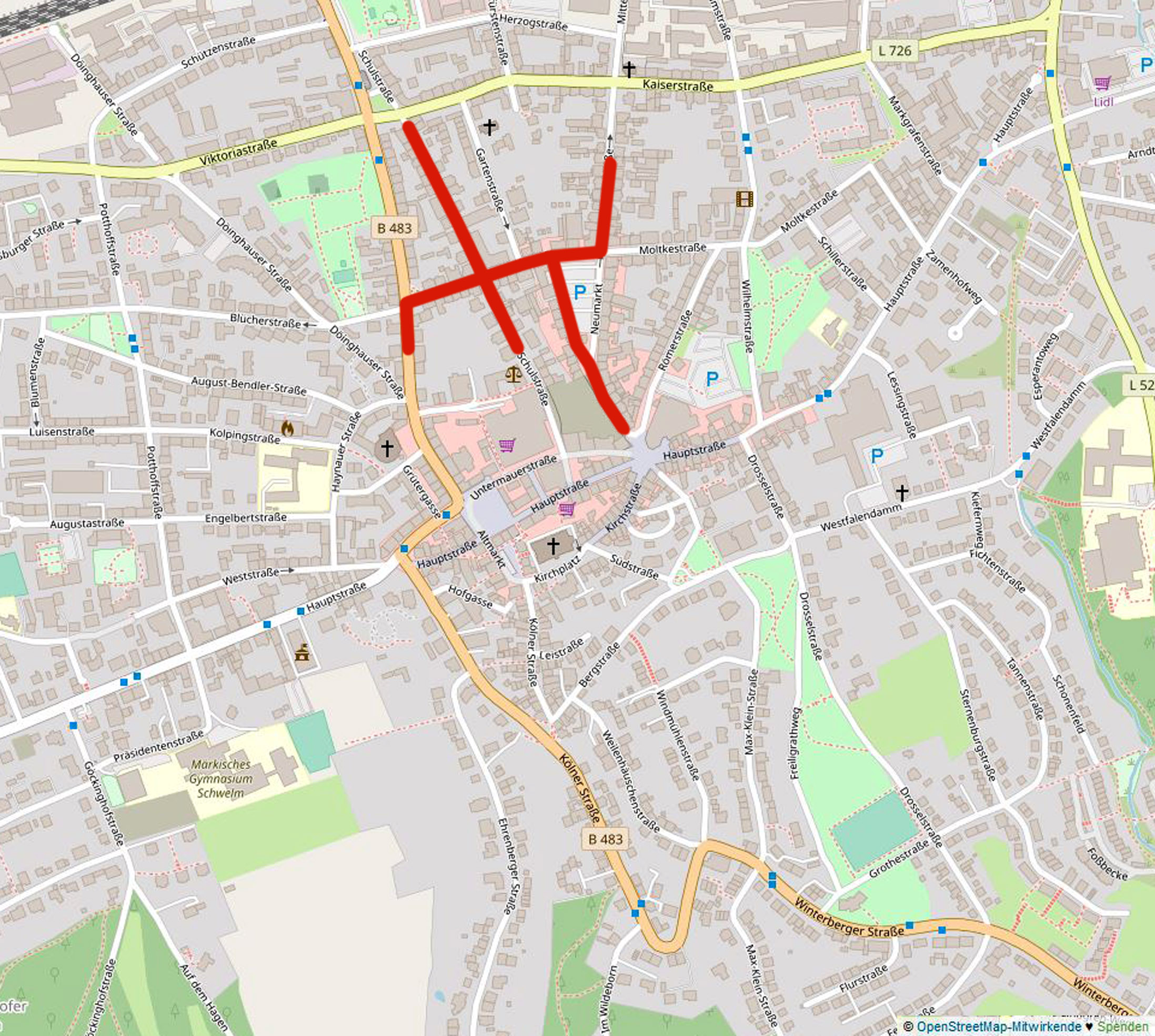 Lage von Bau- und Bodendenkmälern in Schwelm, rot markiert ein Bereich Schulstraße, Bahnhofstraße, Bismarckstraße, Mittelstraße, Neumarkt. Kartenvorlage aus OpenStreetMap wurde um Markierung (rot) ergänzt.